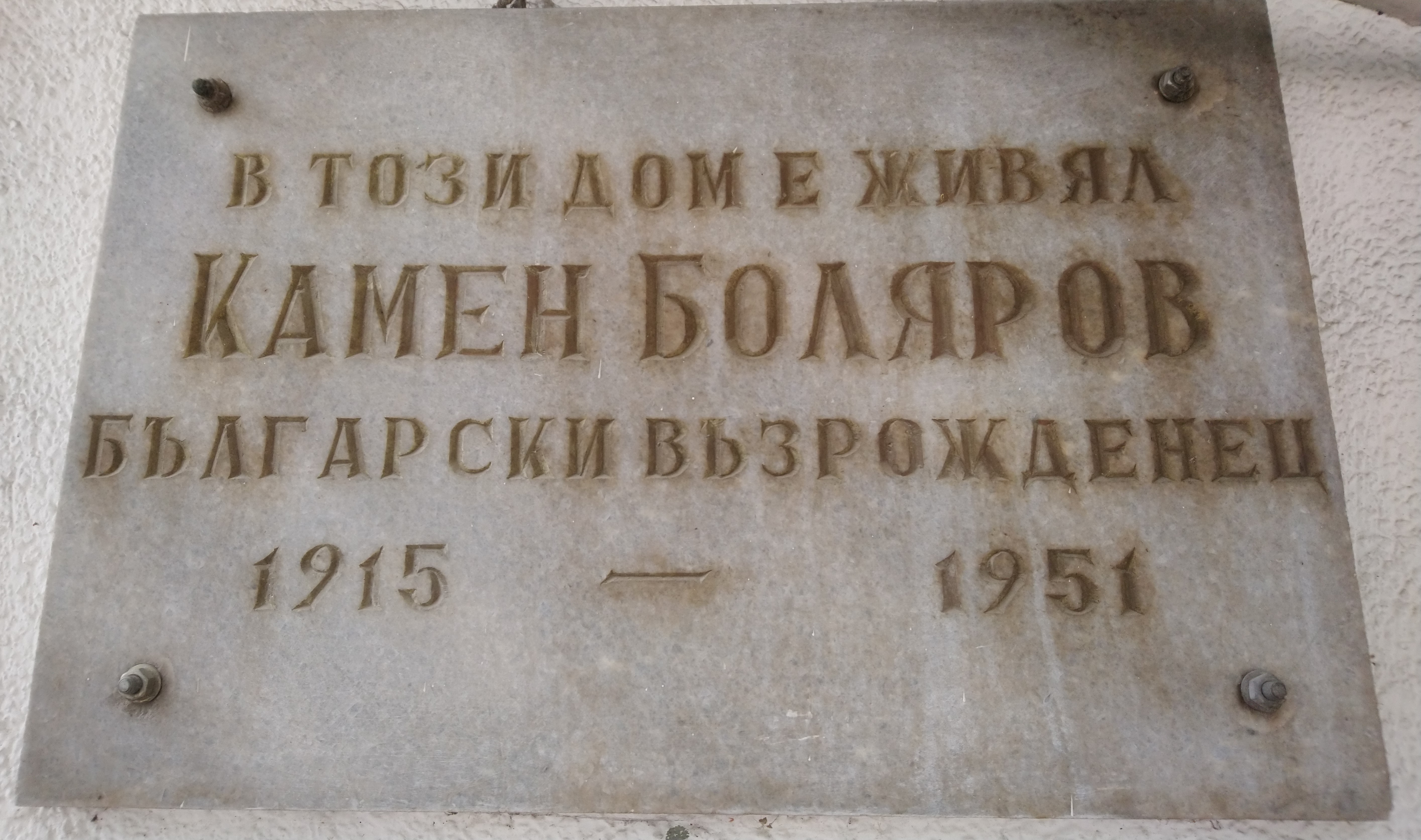 Смолян - паметна плоча на Камен Боляров